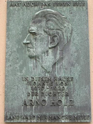 Gedenkschild für Arno Holz, Berlin (Ort: Berlin-Schöneberg, Stübbenstr. 5)